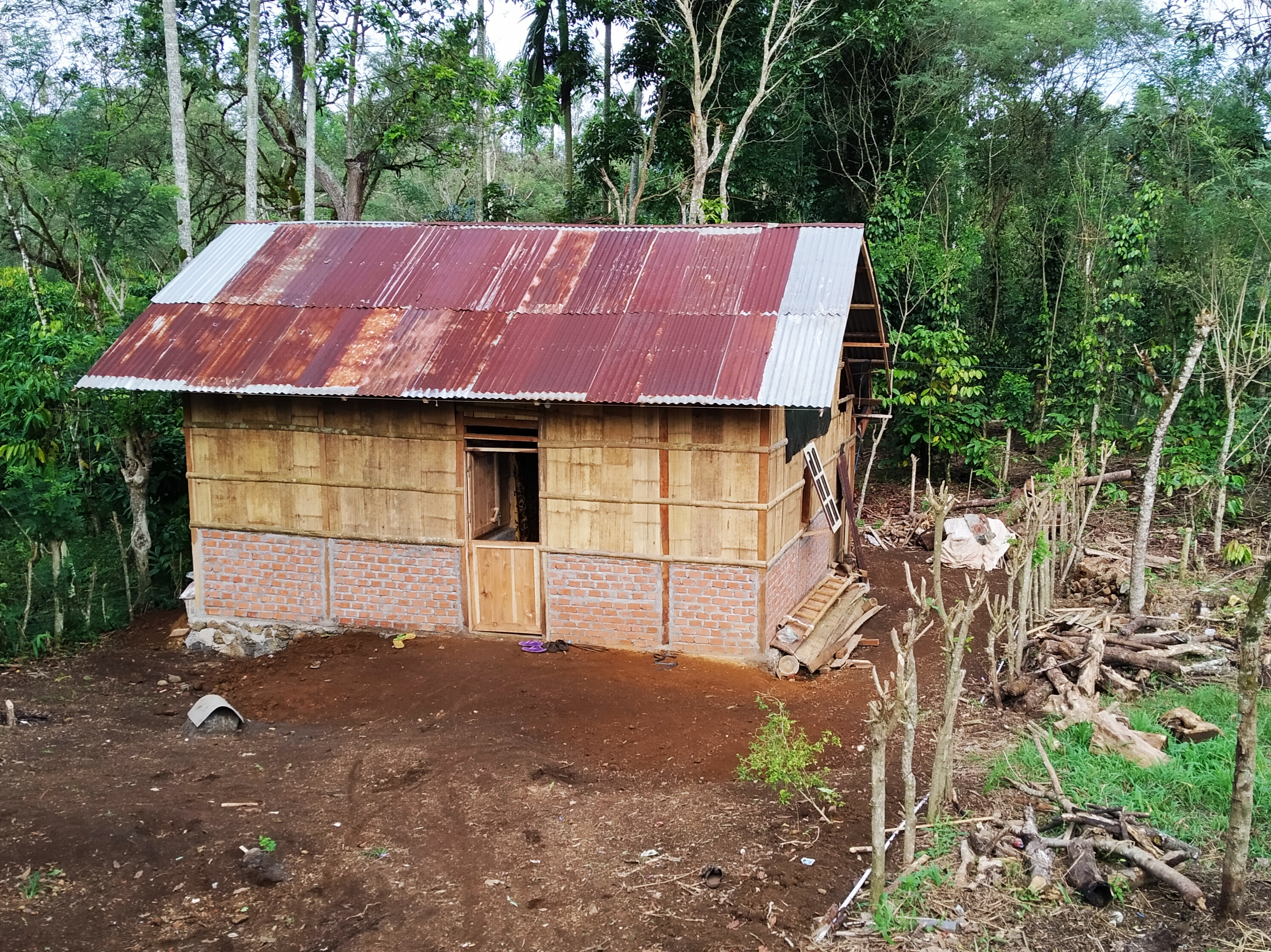 Rumah sederhana di Kabupaten Kepahiang